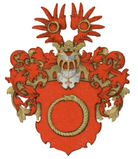 Neffi suguvõsa aadlivapp